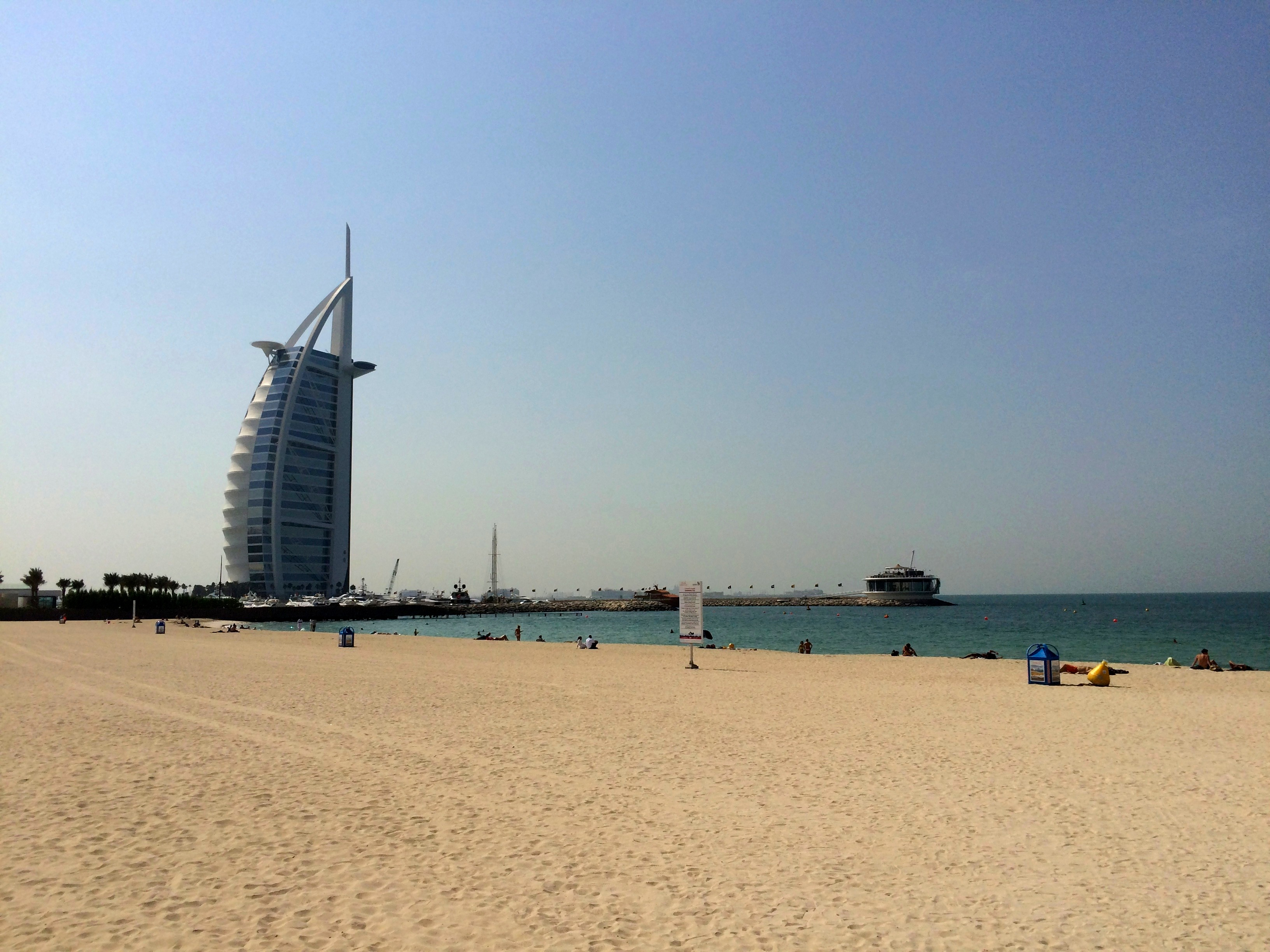 Jumeirah Beach